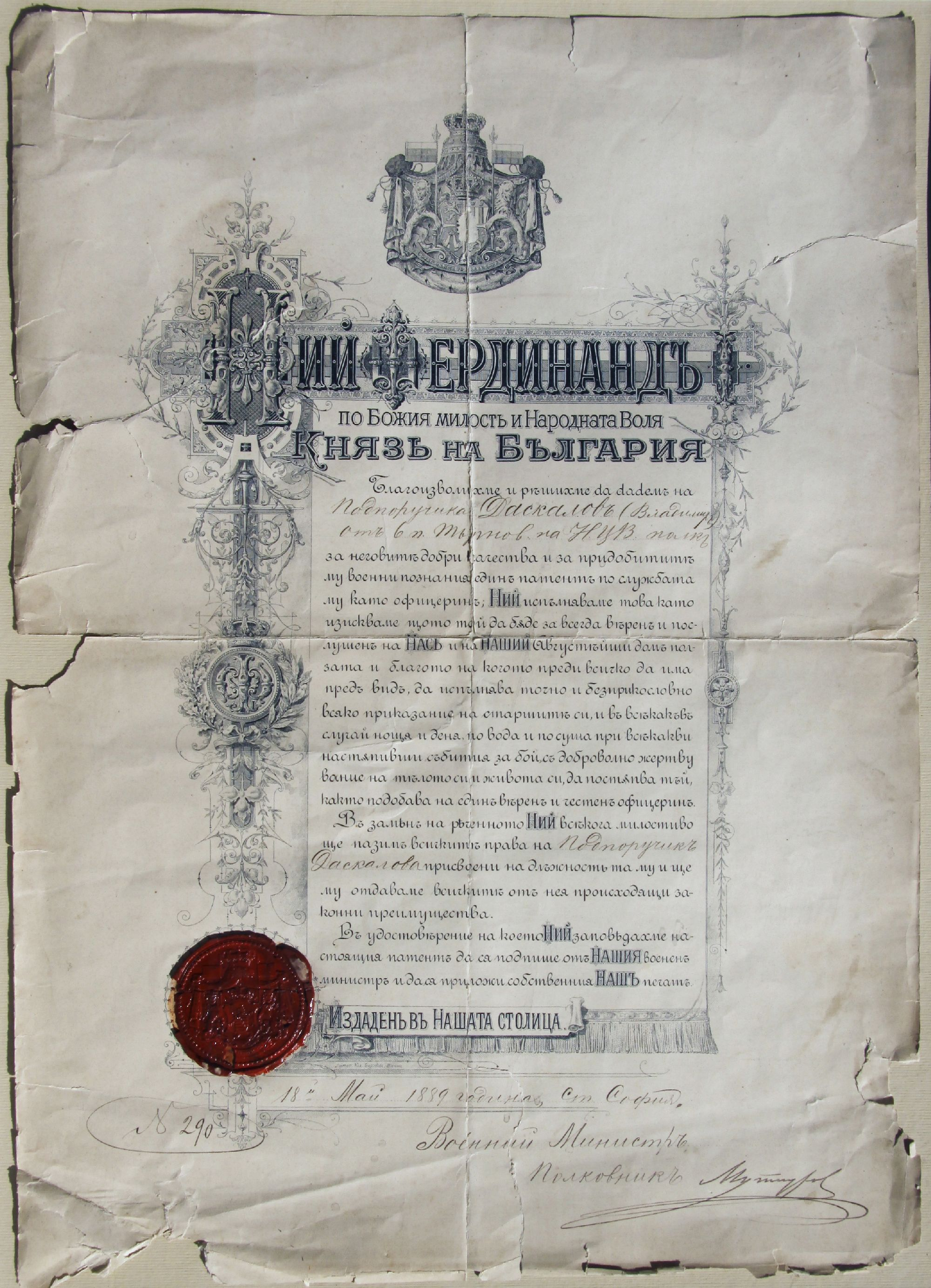 Патент на Владимир Даскалов.